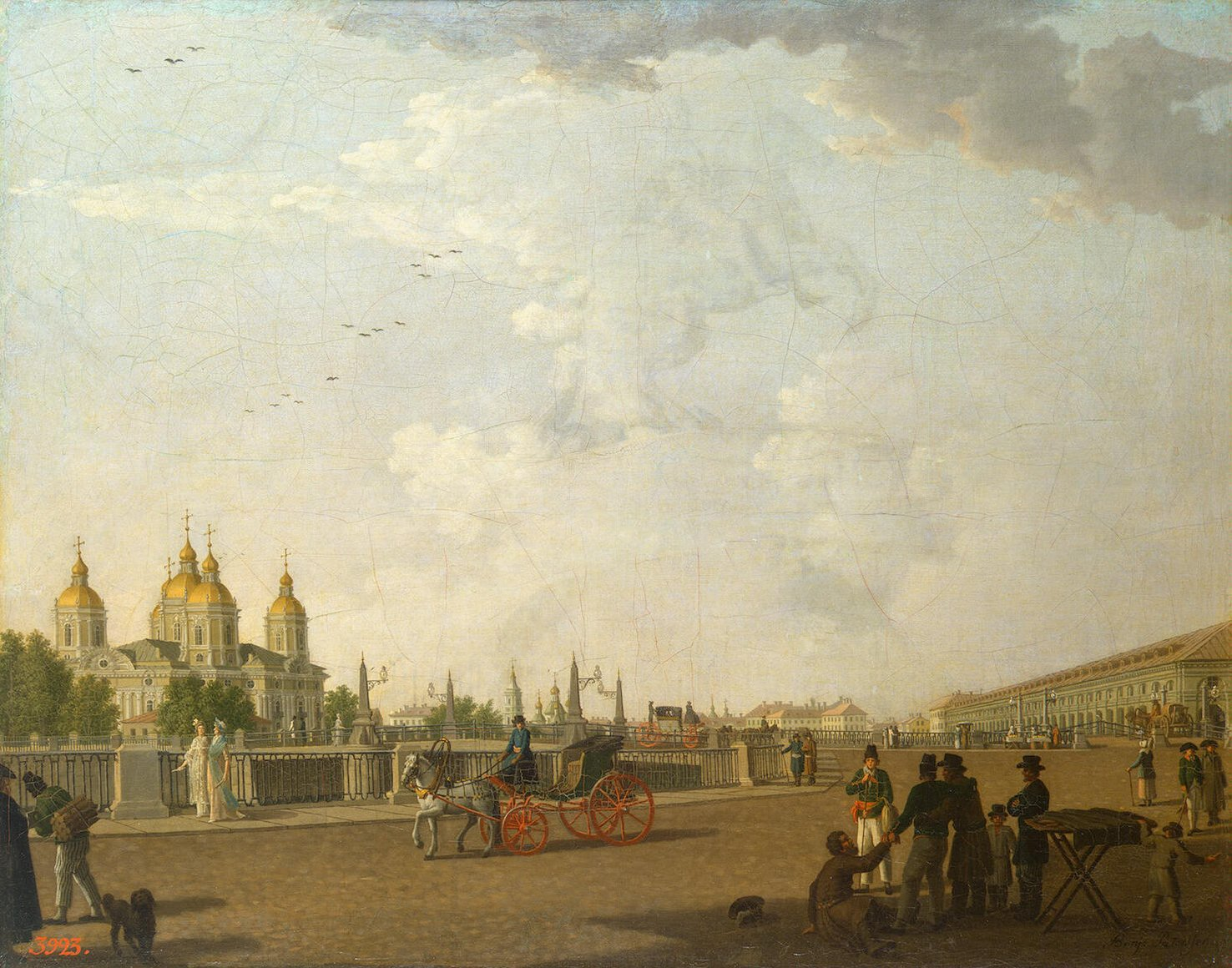 View of St. Nicolas Cathedrallabel QS:Len,"View of St. Nicolas Cathedral"label QS:Lru,"Вид Никольского собора» работы Бенжамена Патерсена. Картина поступила в Эрмитаж из Государственного Русского музея (ГРМ) в 1950 году."